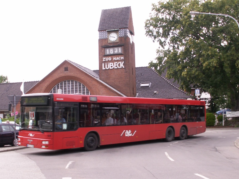 MAN bus